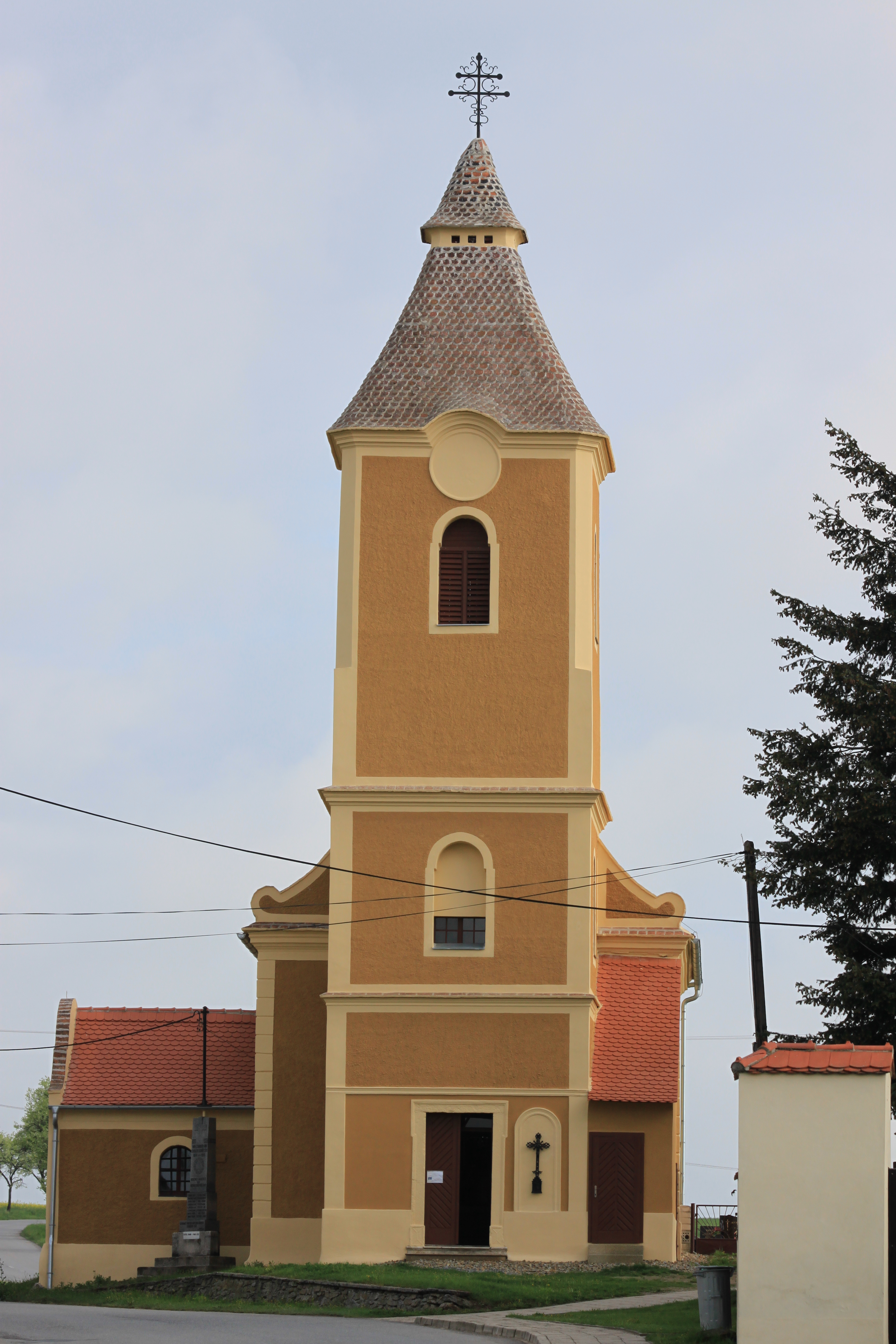 Chvalatice kostel